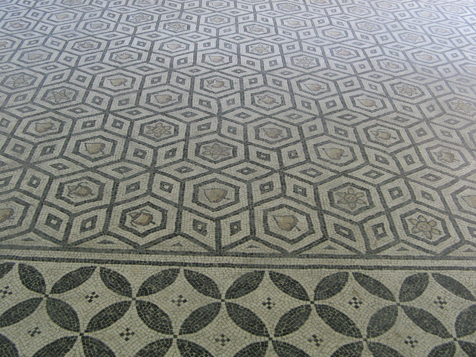 Mosaikfussboden der Villa rustica von Zofingen